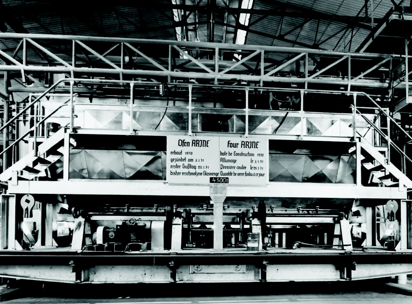 Floatglasanlage